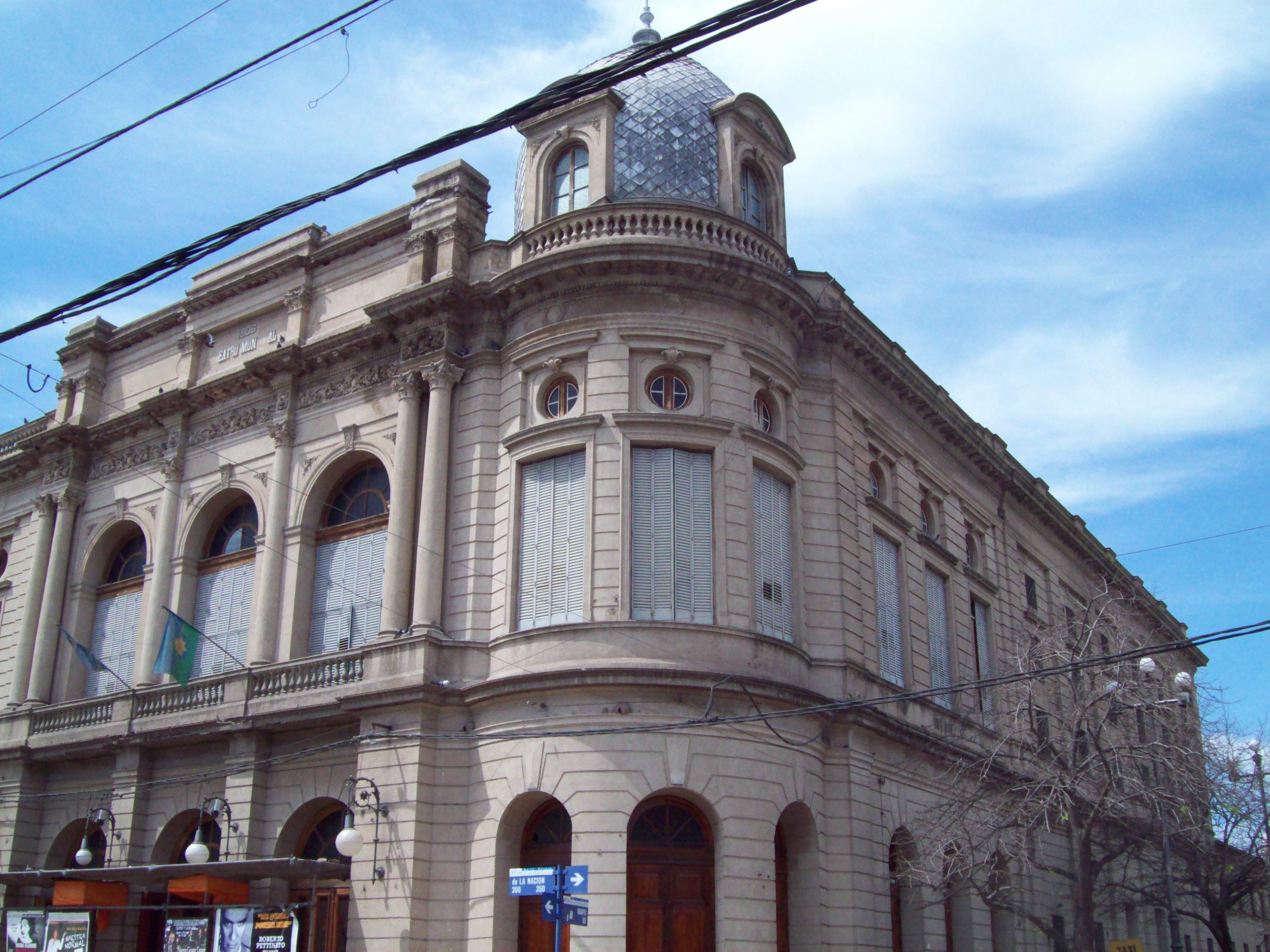 Teatro Municipal Rafael de Aguiar (Arq. Luis Badini y Emilio Perla, 1906-08). San Nicolás, Pcia. de Buenos Aires.